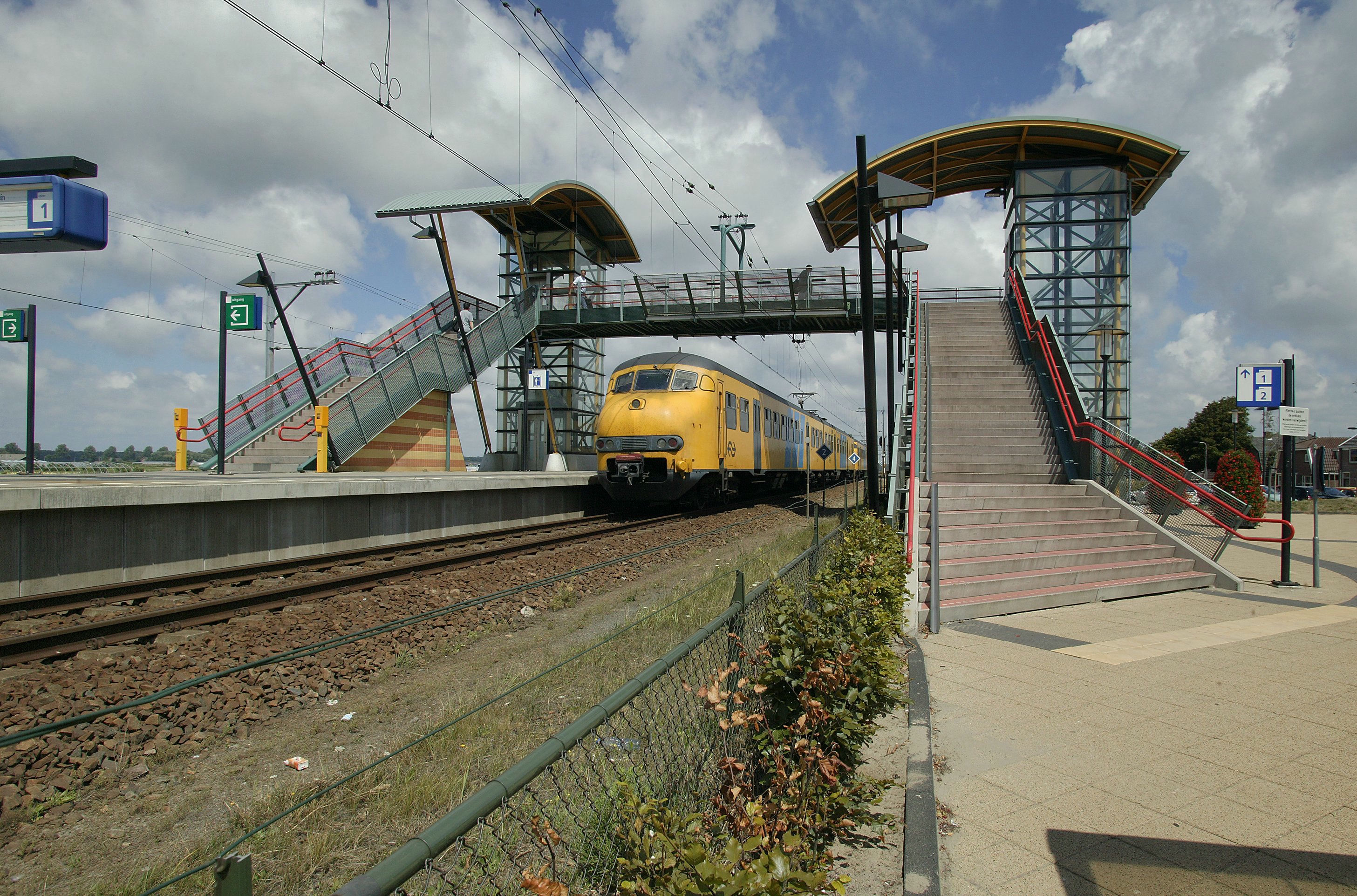 Cultuurlandschap/ Station: Station Hillegom